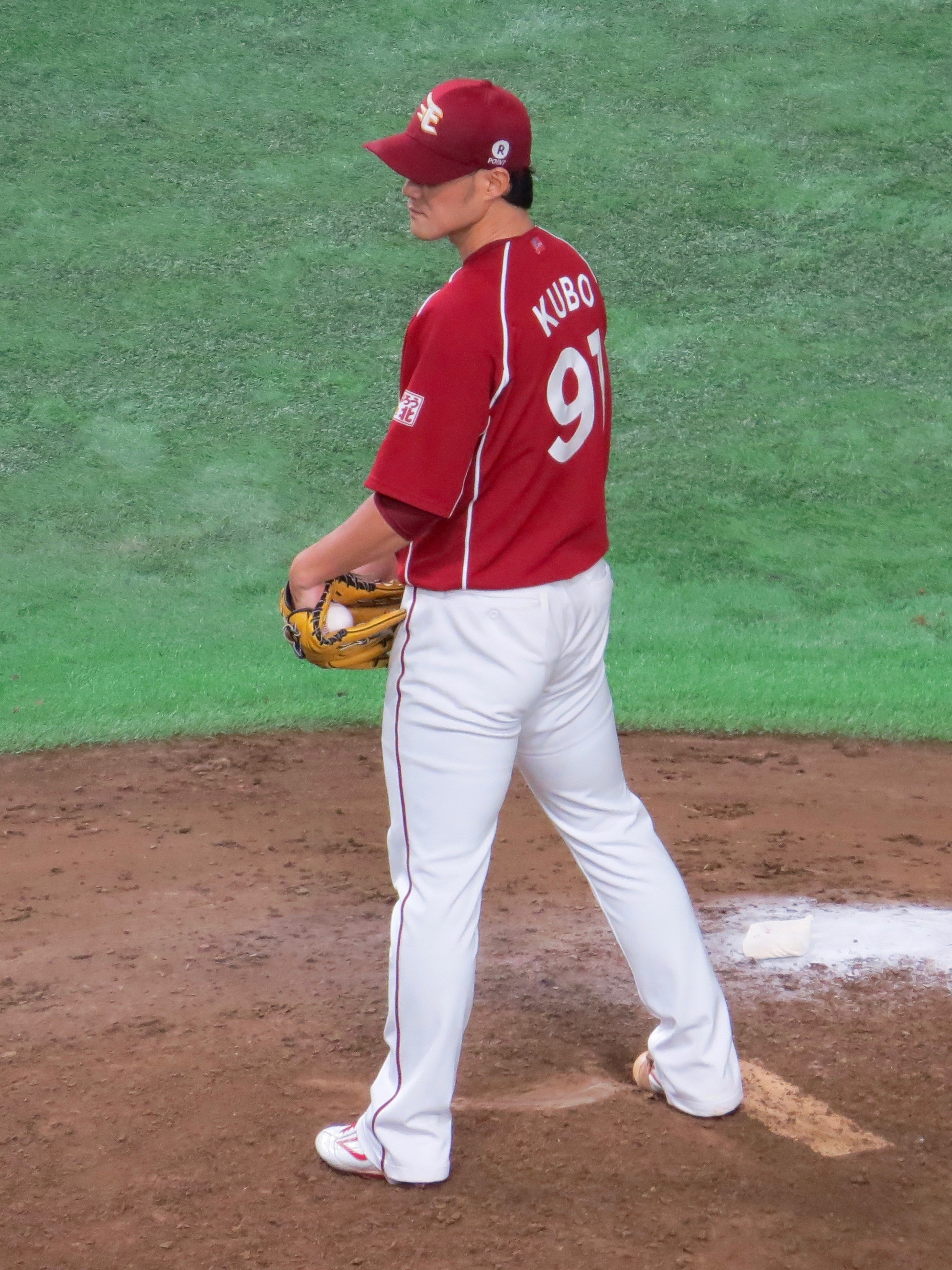 東京ドームにて